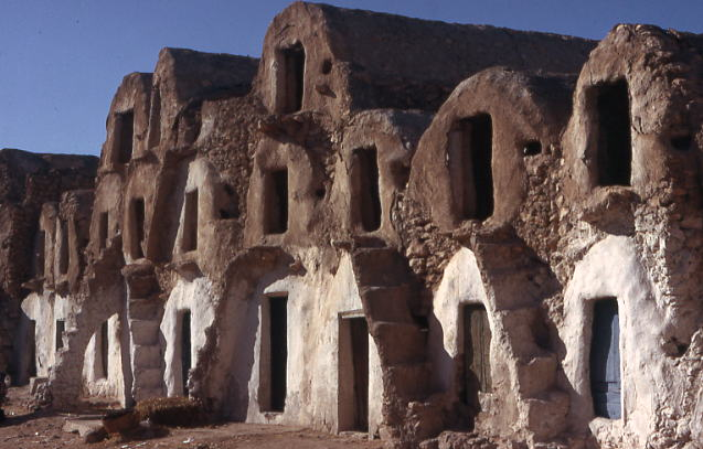 Ghorfas, Medenine, Tunisie